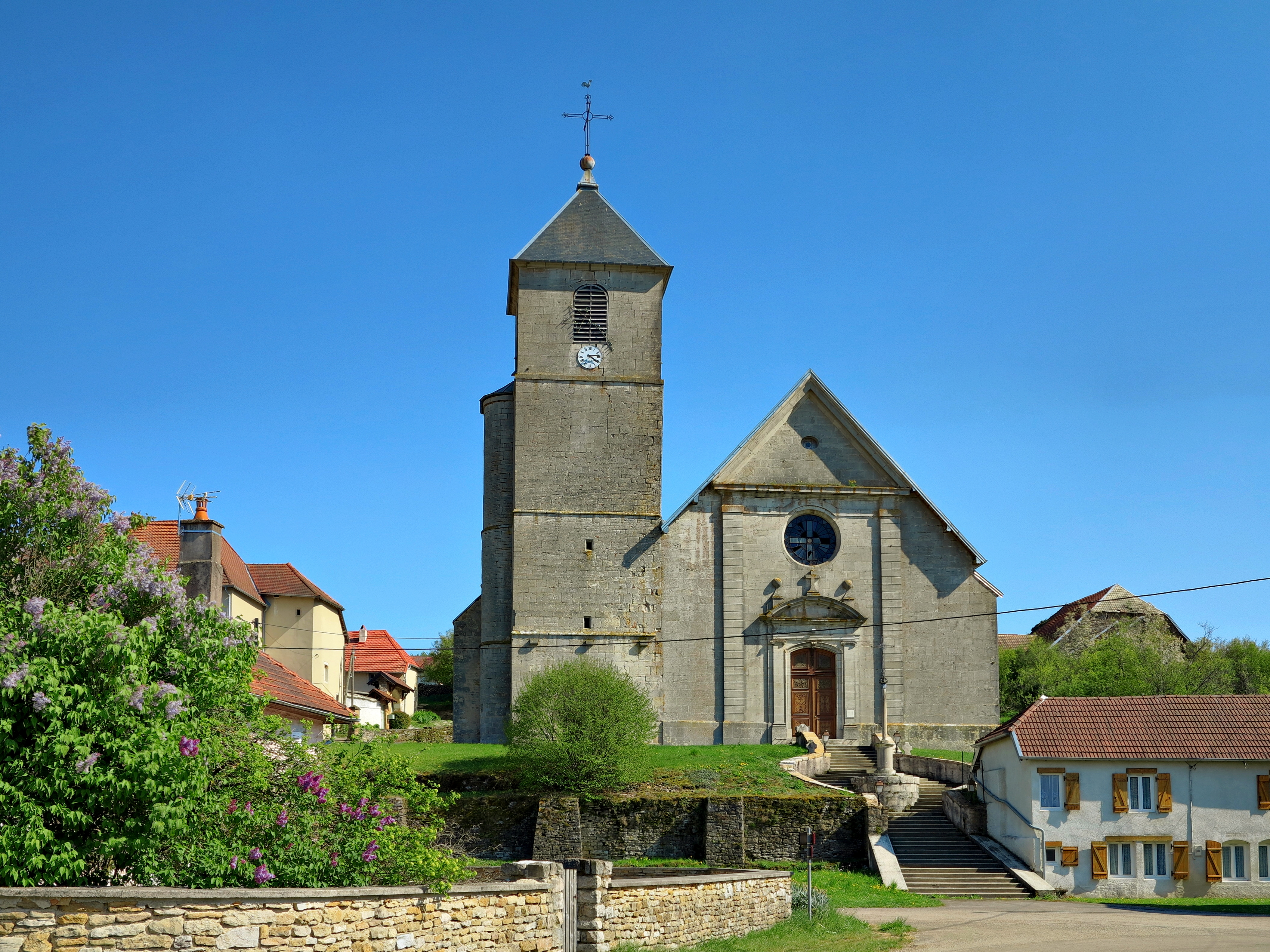 L'église sur son tertre